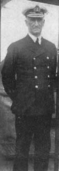 John de Robeck